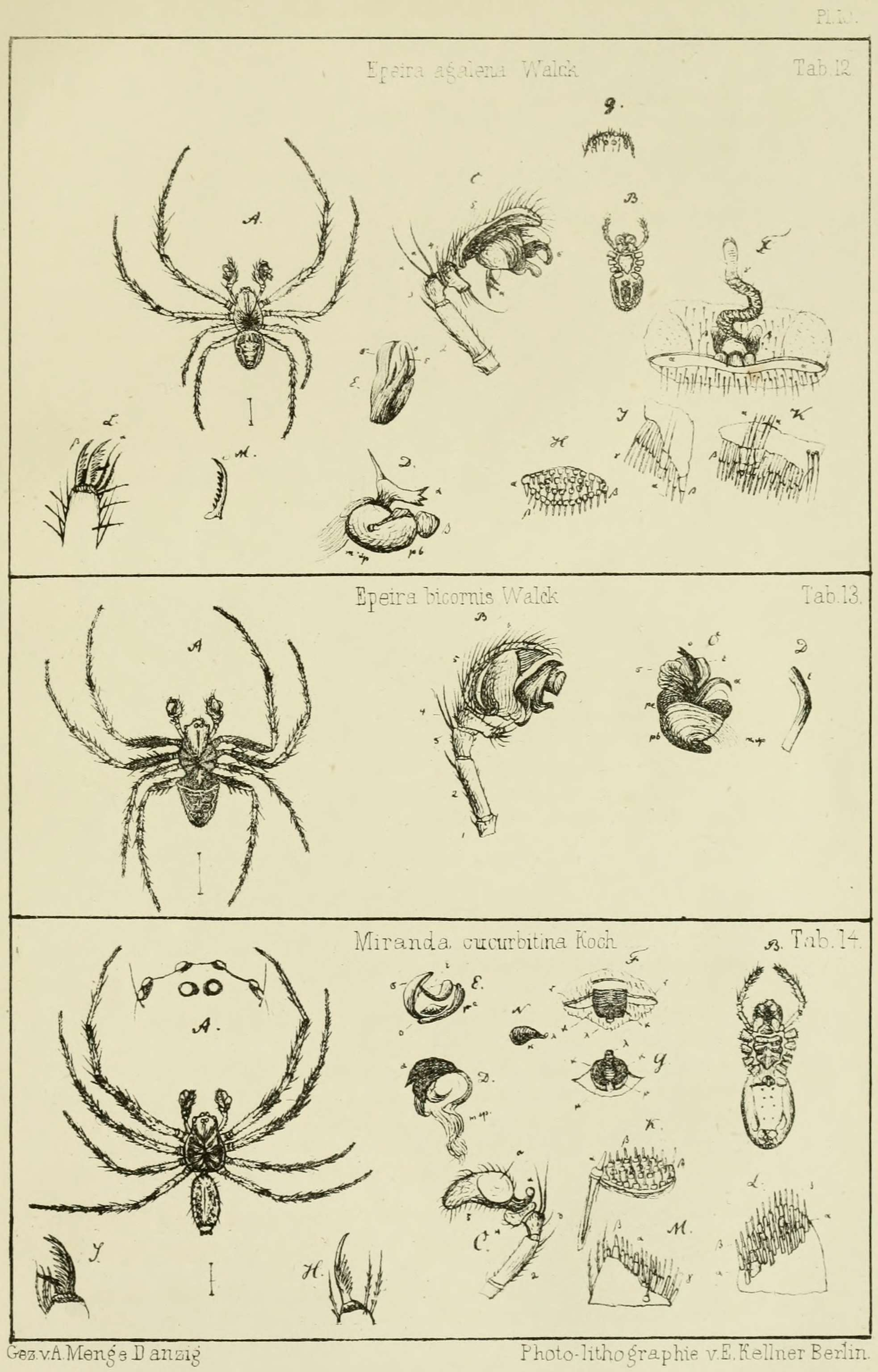 Anton Menge: Preussische Spinnen. I. Abtheilung. Tafel 10 - 12. Epeira agalena Walck. 13. Epeira bicornis Walck. 14. Miranda cucurbitina Koch.. In: Schriften der Naturforschenden Gesellschaft in Danzig. Erster Band drittes und viertes Heft. Druck von A. W. Kafemann, Danzig 1866